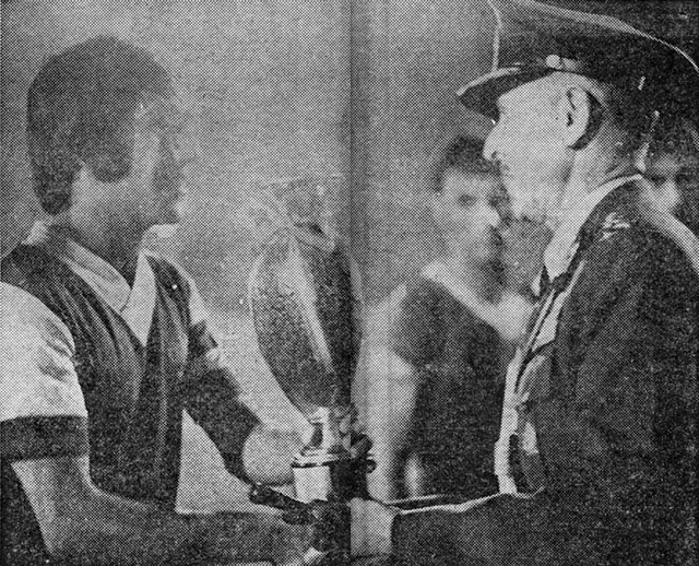 اهدای جام قهرمانی جام دوستی به علی جباری کاپیتان تاج